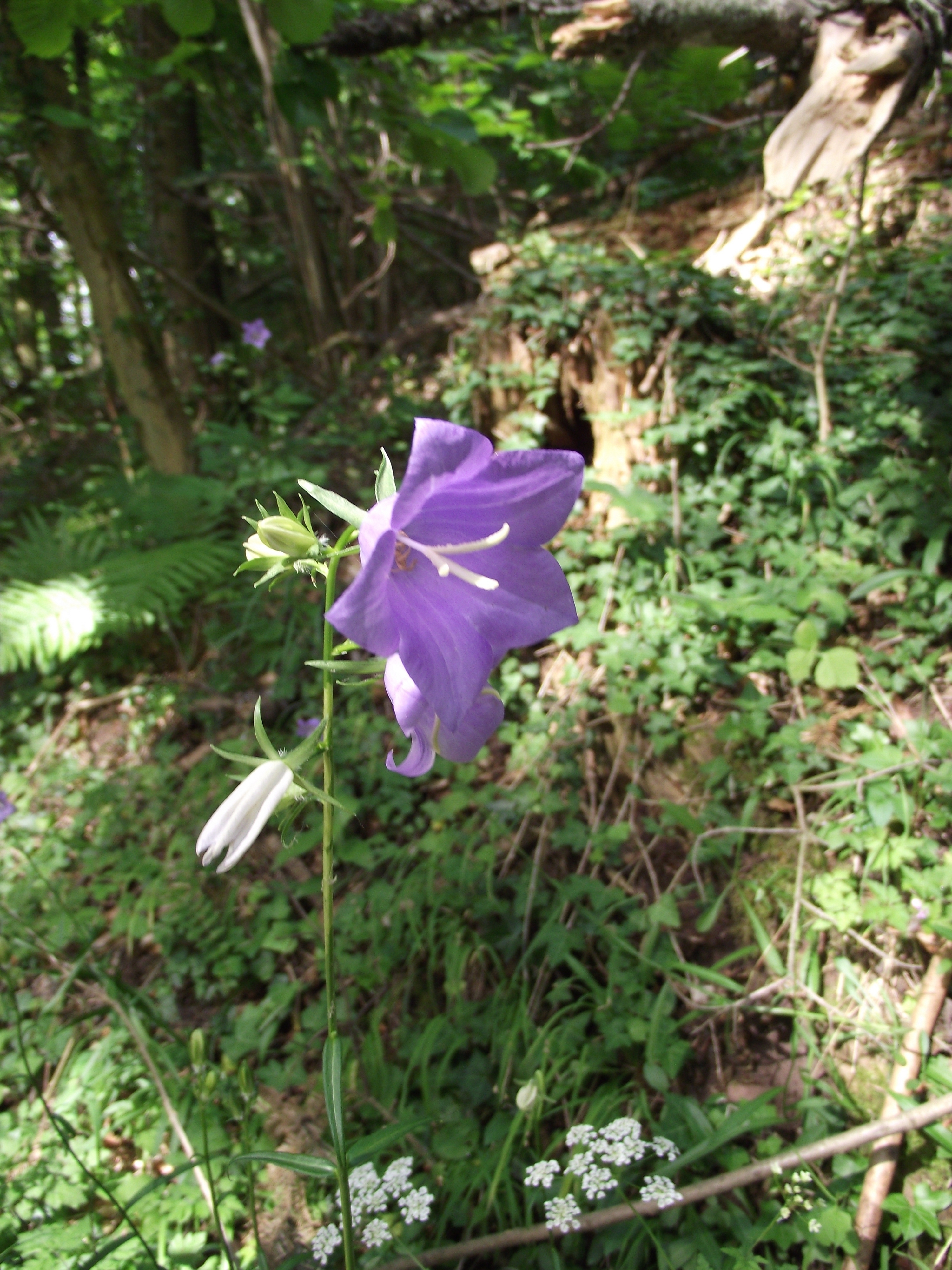 Campanule de Baumgart (Campanula baumgartenii) dans les Vosges du Nord.